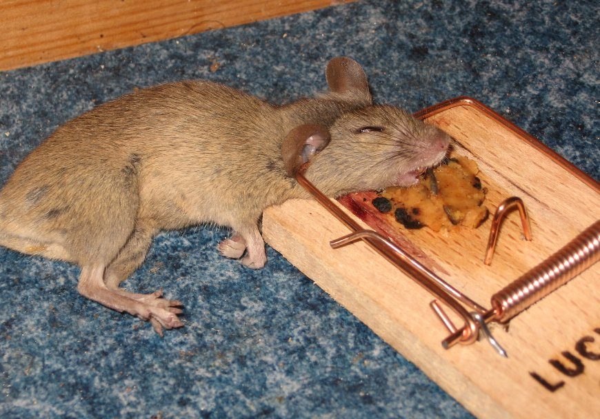 Photo taken by Hankwang.